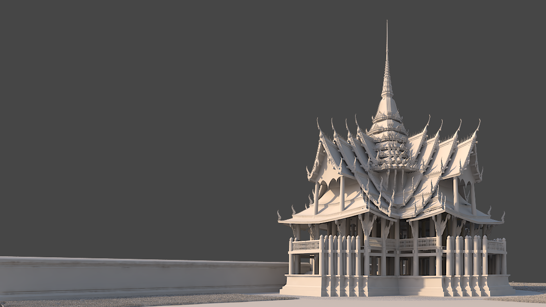 พระที่นั่งจักรวรรดิ์ไพชยนต์